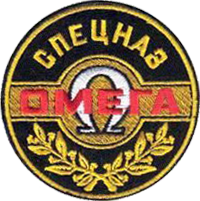 логотип спецпідрозділу Омега Національної гвардії України